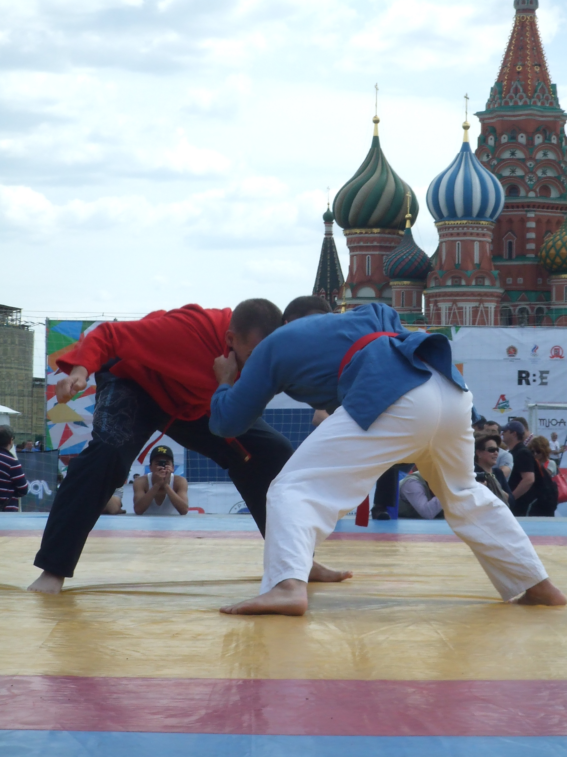 Иллюстрация с турнира на Красной площади по русской борьбе "За вороток", май 2012 года